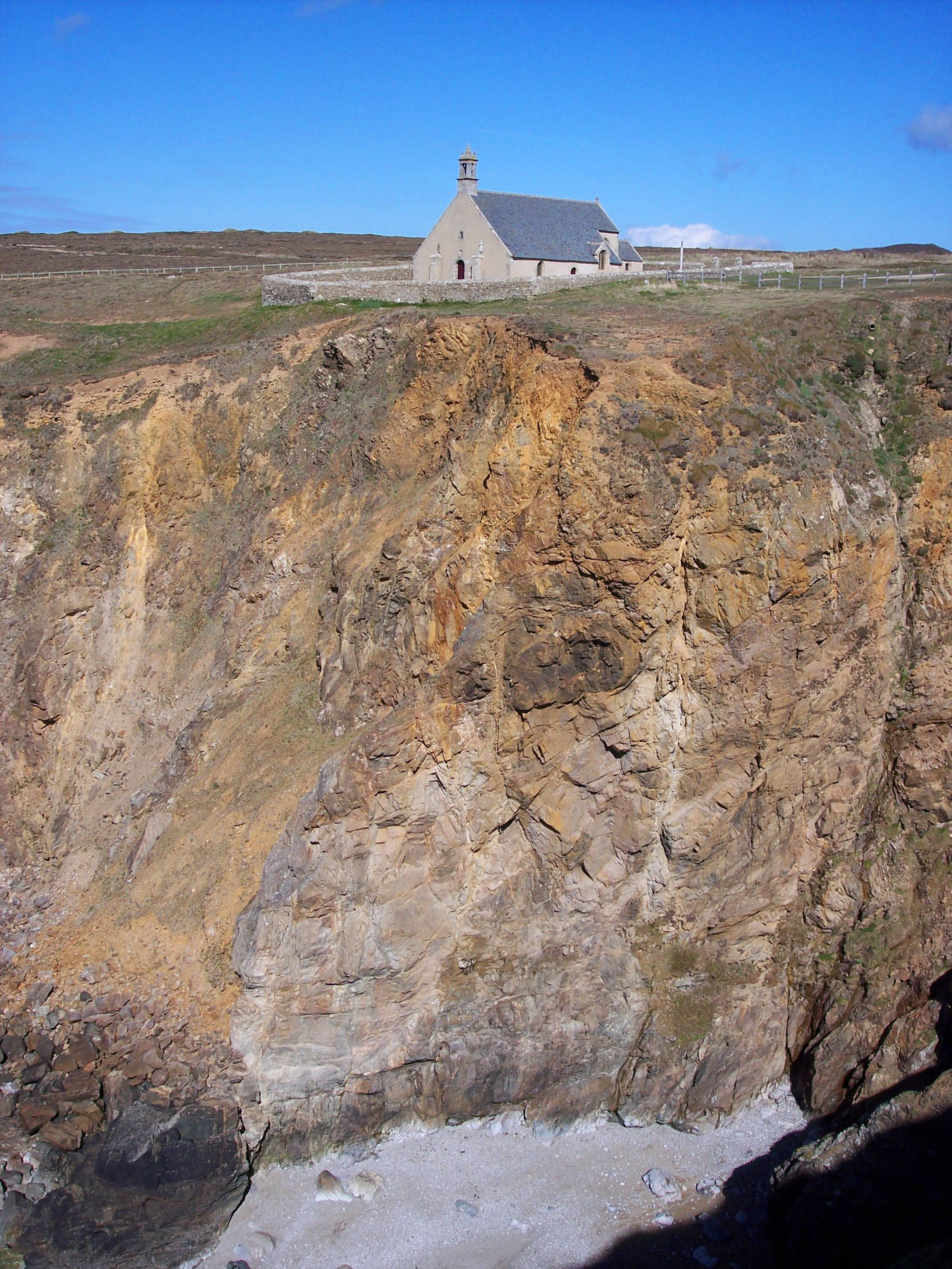 la chapelle saint-They (pointe du Van)